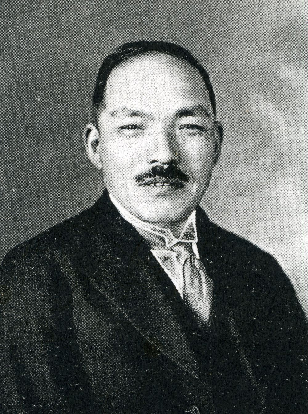 この写真は、紫安新九郎（1873-1952）の写真です。